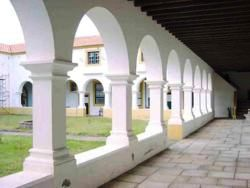 Convento de São Gonçalo, freguesia da Sé, cidade e concelho de Angra do Heroísmo, ilha Terceira, Açores: aspecto do claustro.